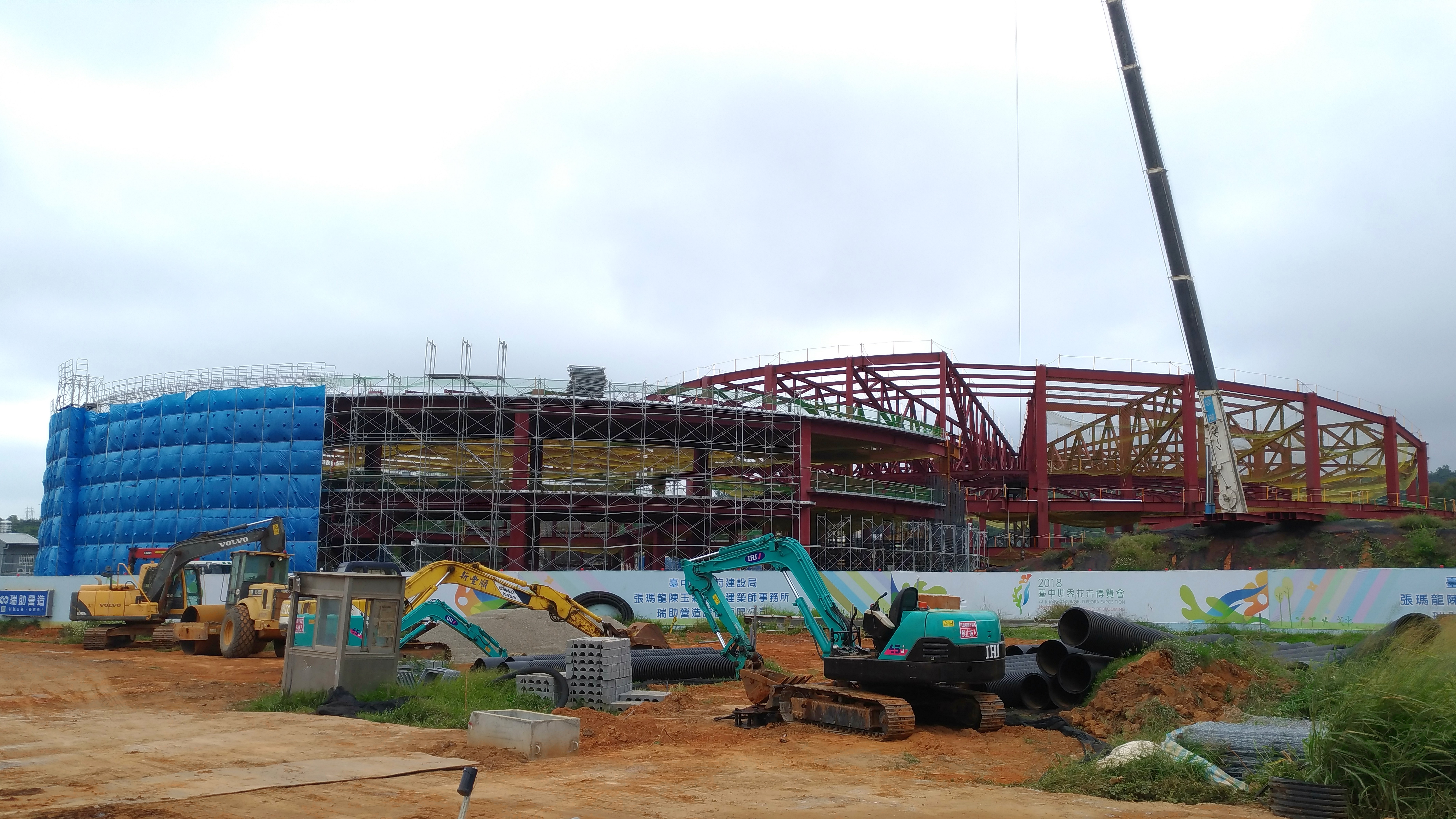 臺中花博后里花豔館2017年11月工程